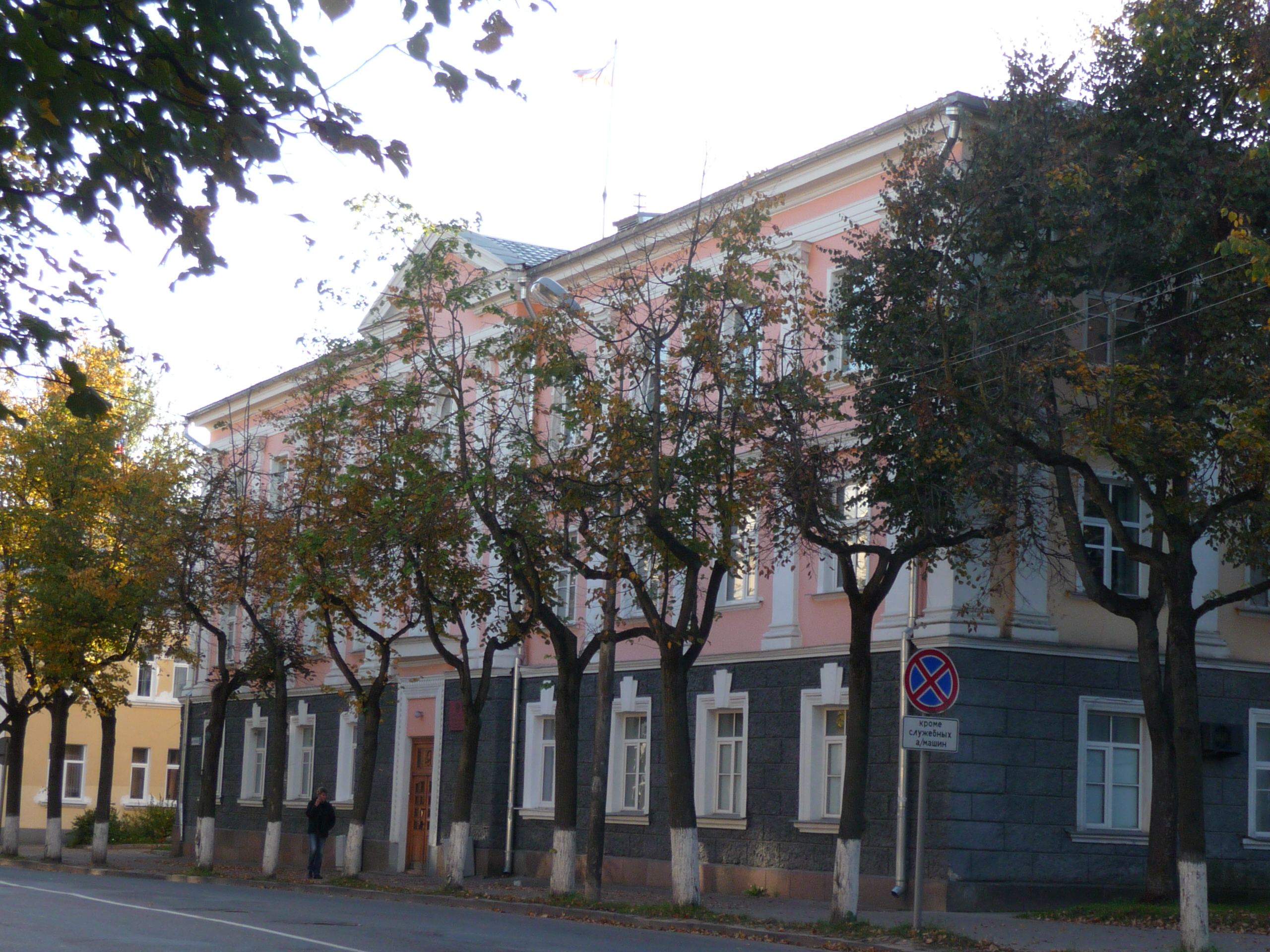 Псковская городская администрация